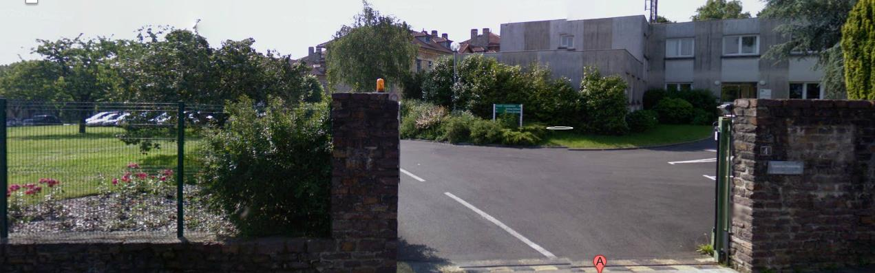 Centre de psychiatrie infanto-juvénile du Centre Hospitalier Guillaume Régnier de Rennes